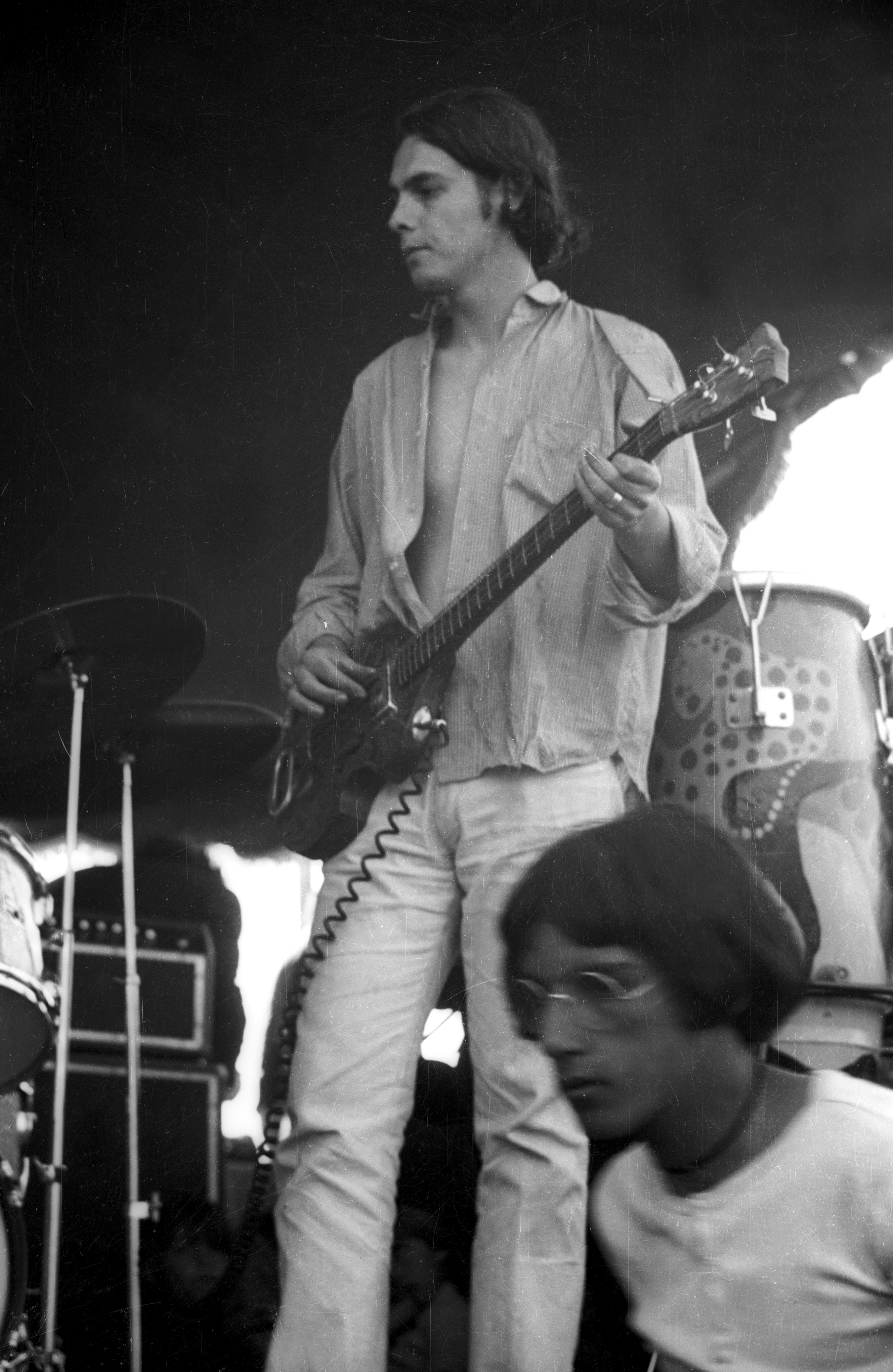 Mario Mutis (el bajista de los Jaivas). Nacido en Viña del Mar, 20 de octubre de 1947, es un músico chileno. Se ha desempeñado como bajista y vocalista de la banda chilena Los Jaivas.